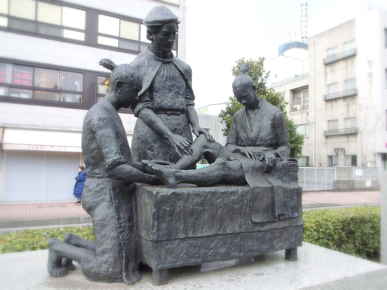 Statue of Luis de Almeida, Oita City, Oita Pref., Japan / 西洋医術発祥記念像（ルイス・デ・アルメイダ像）（大分県大分市）